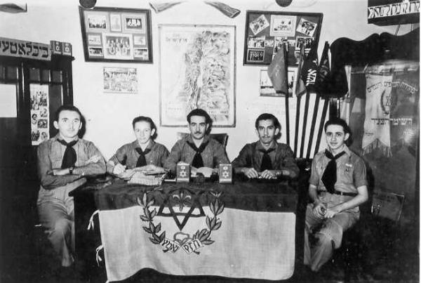 הנהגת השומר הצעיר בהוואנה, קובה